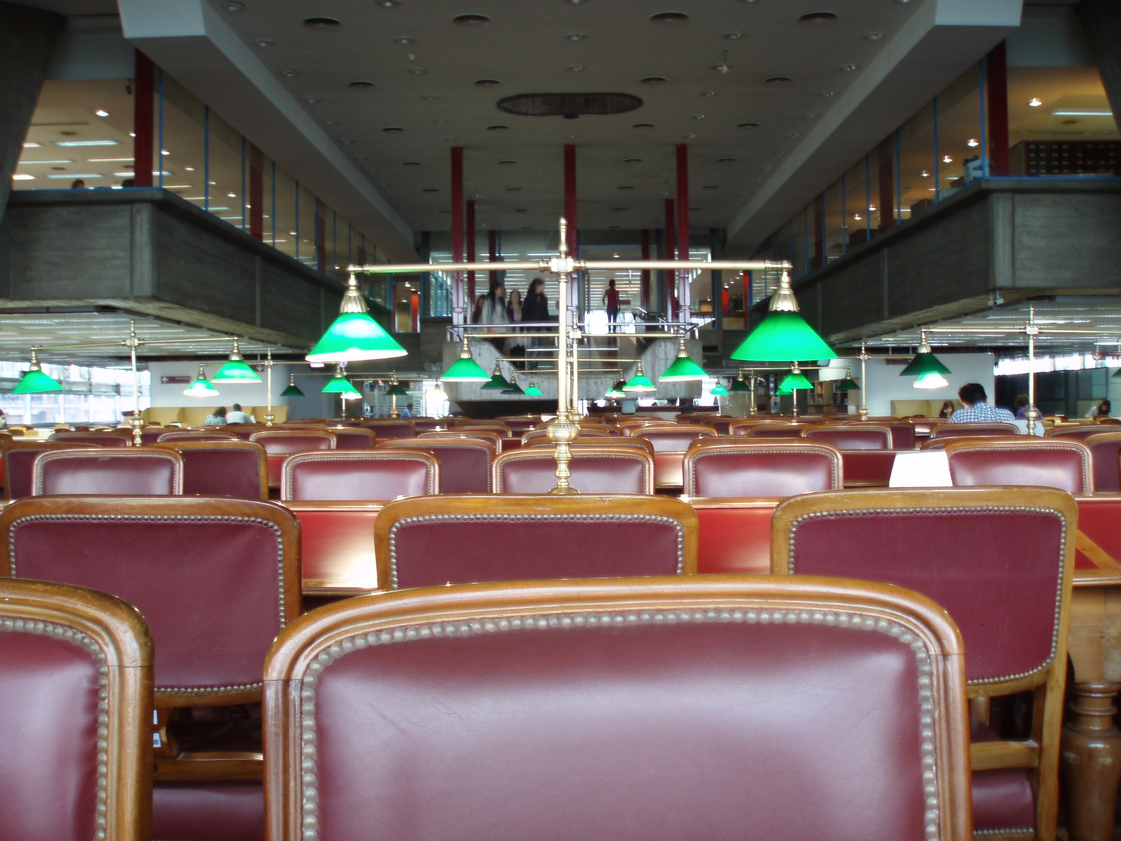 Vista de la sala de lectura de la Biblioteca Nacional de la República Argentina, desde el sector donde se encuentran las mesas y sillas antes pertenecientes al antiguo edificio de la biblioteca, en la calle México al 600. Buenos Aires, Argentina.